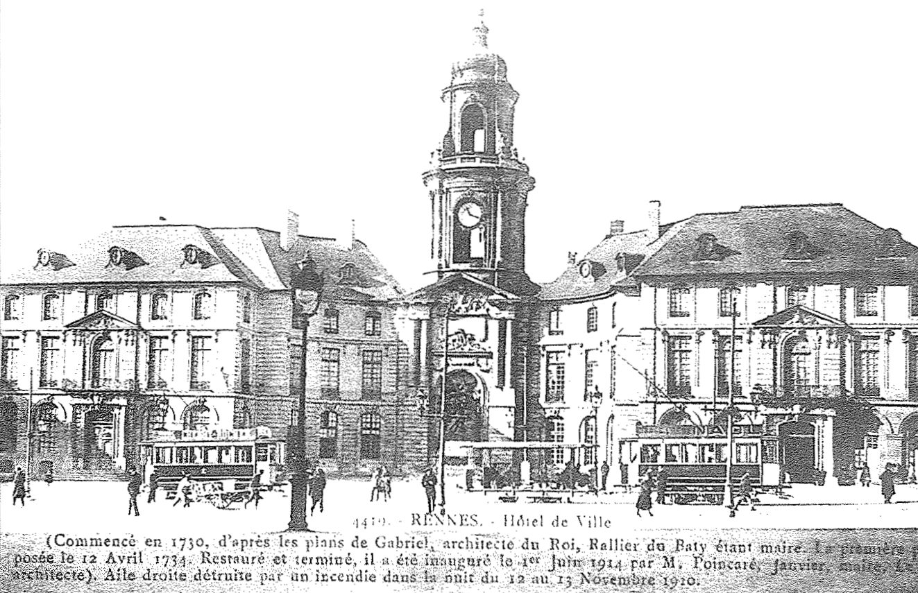 Hôtel de Ville. Début du 20ème siècle, tramways de Rennes.